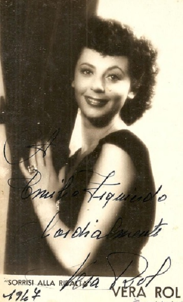 Vera Rol, con autografo